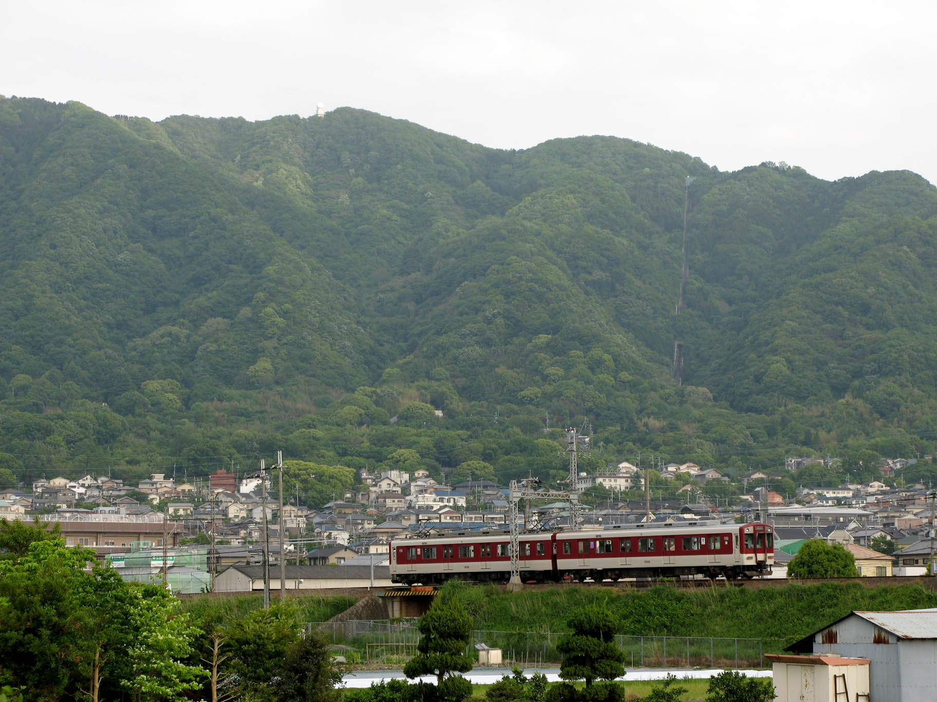 近鉄信貴線（山本-服部川間）を走る1430系電車。背景は高安山。 2007年5月撮影。 機材：PowerShot G7 撮影者：Kansai explorer 撮影後レタッチ・リサイズ